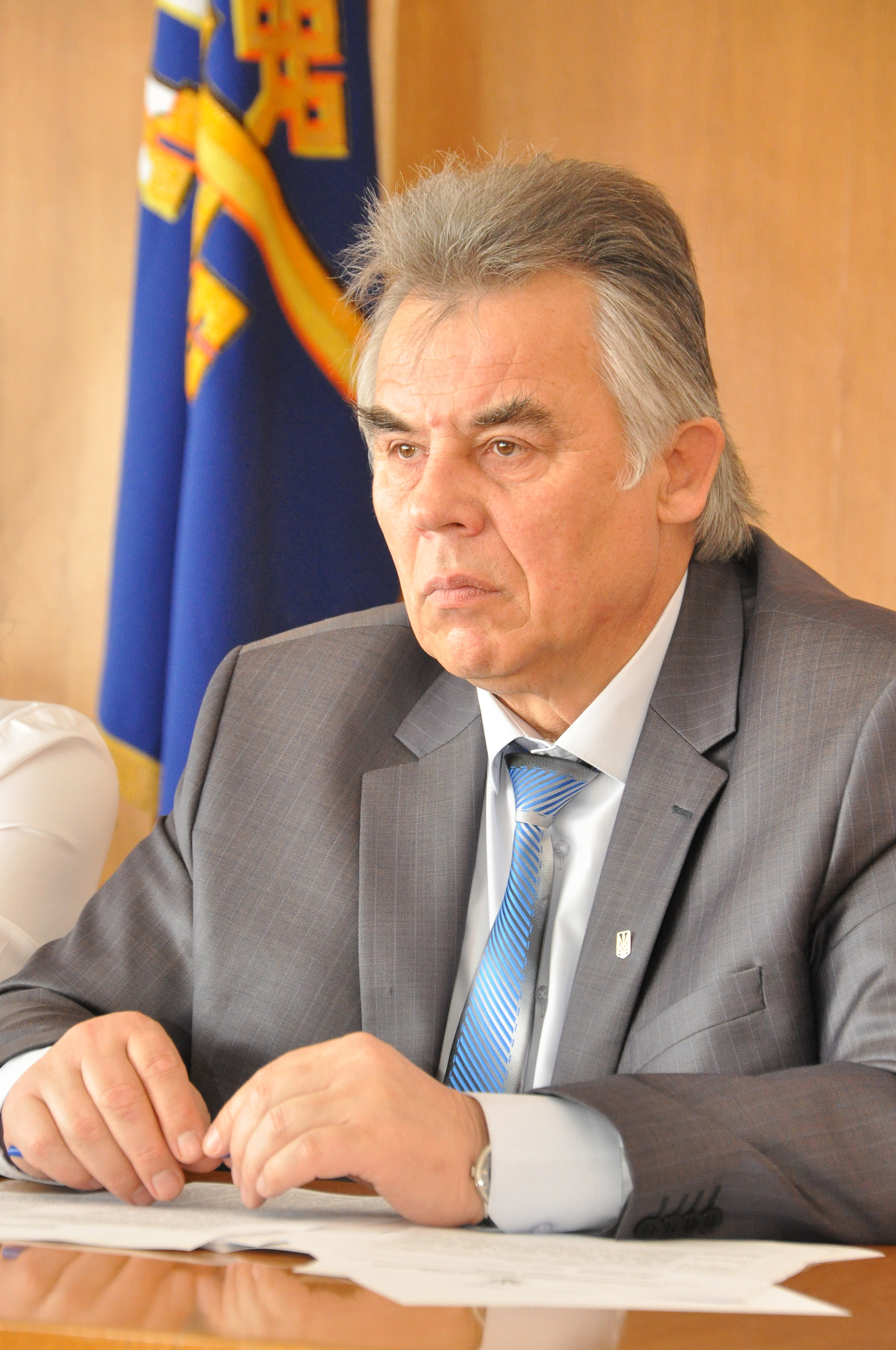 Український вчений-лікар, освітянин, кандидат медичних наук, заслужений лікар України, директор Чортківського державного медичного коледжу Любомир Білик.